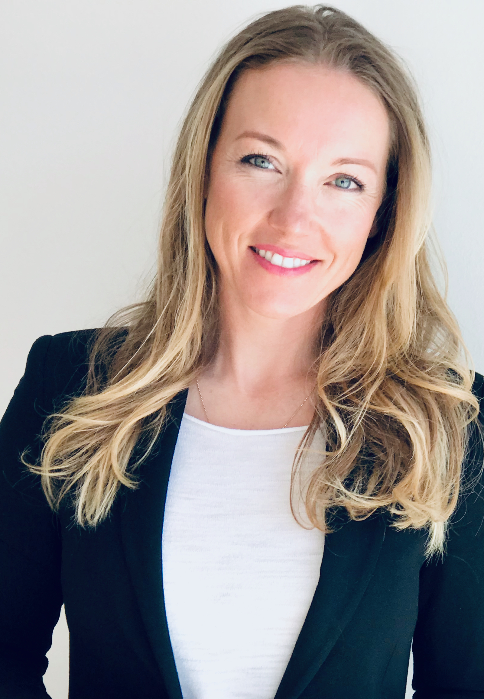 Portrait Anke Blöchl